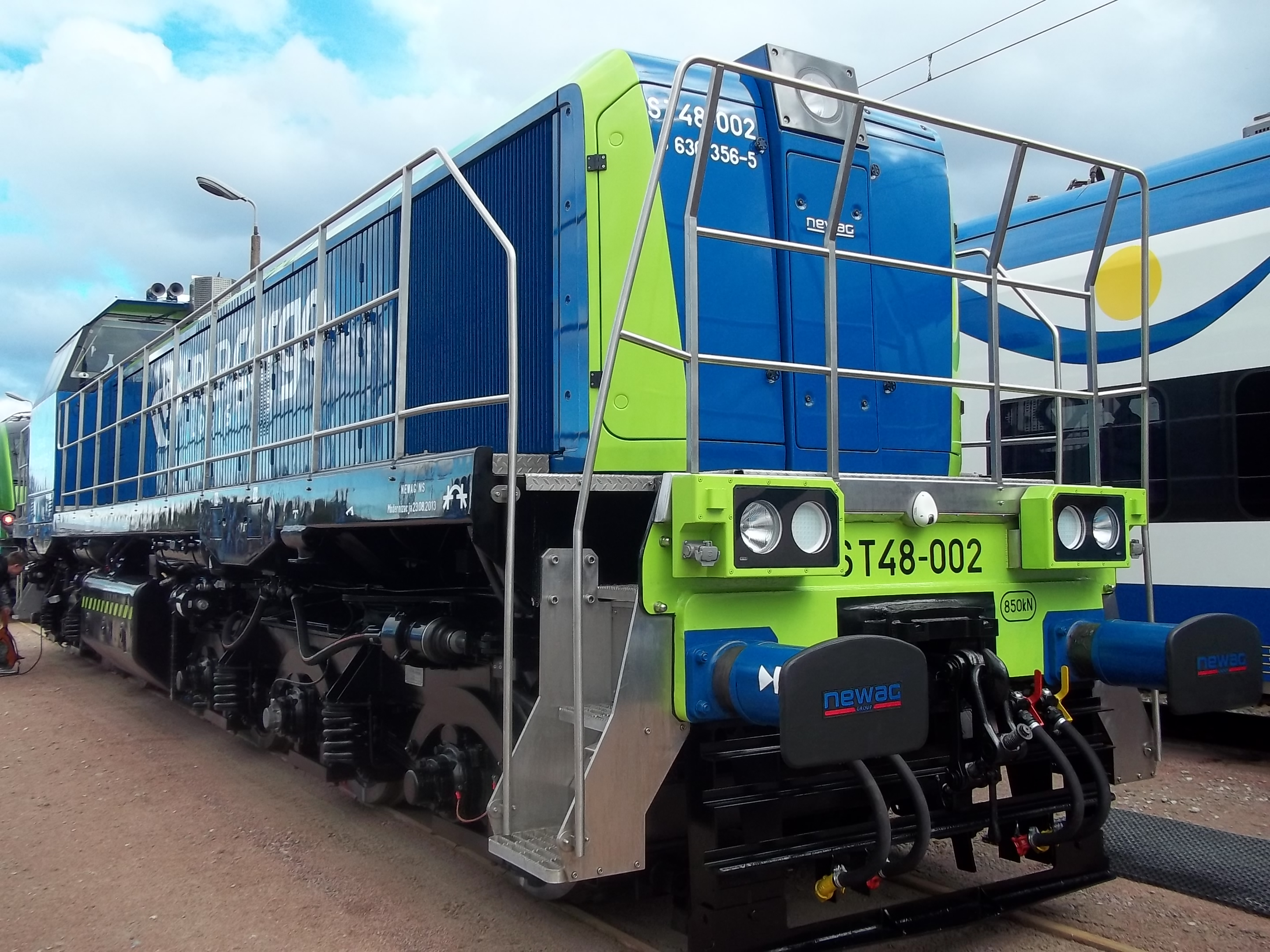 Zmodernizowana lokomotywa spalinowa TEM-2 do wersji ST48 wykonana przez Grupę NEWAG.